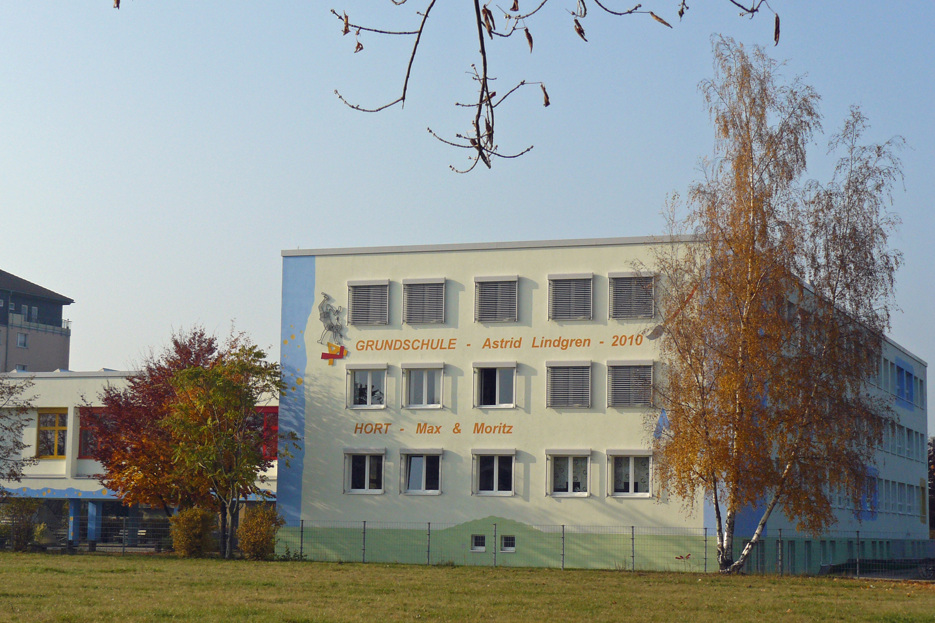 Astrid Lindgren Grundschule auf dem Schomberg in Spremberg/ Niederlausitz am 2. November 2011